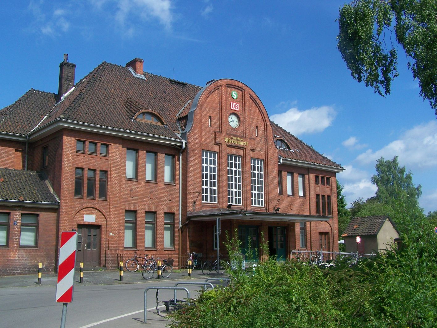 Bahnhof Langenhagen Pferdemarkt